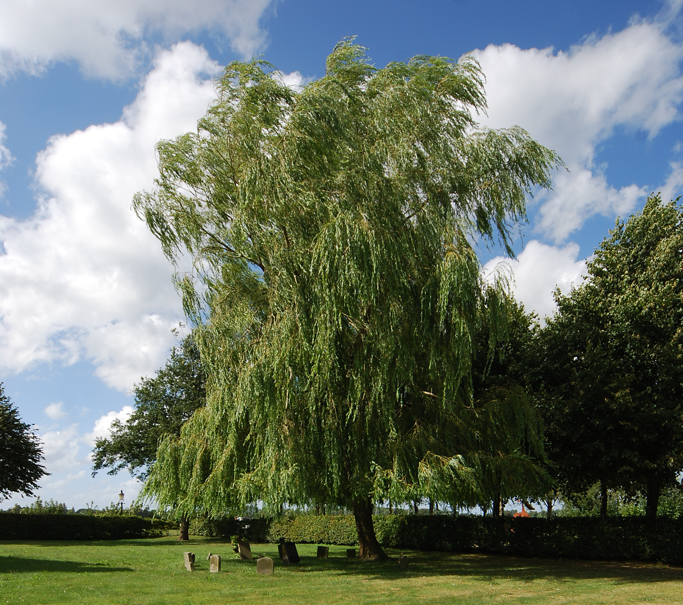 Alter Jüdischer Friedhof an der Straße Am Treenefeld in Friedrichstadt im Kreis Nordfriesland in Schleswig-Holstein